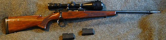 A Bolt Rifle